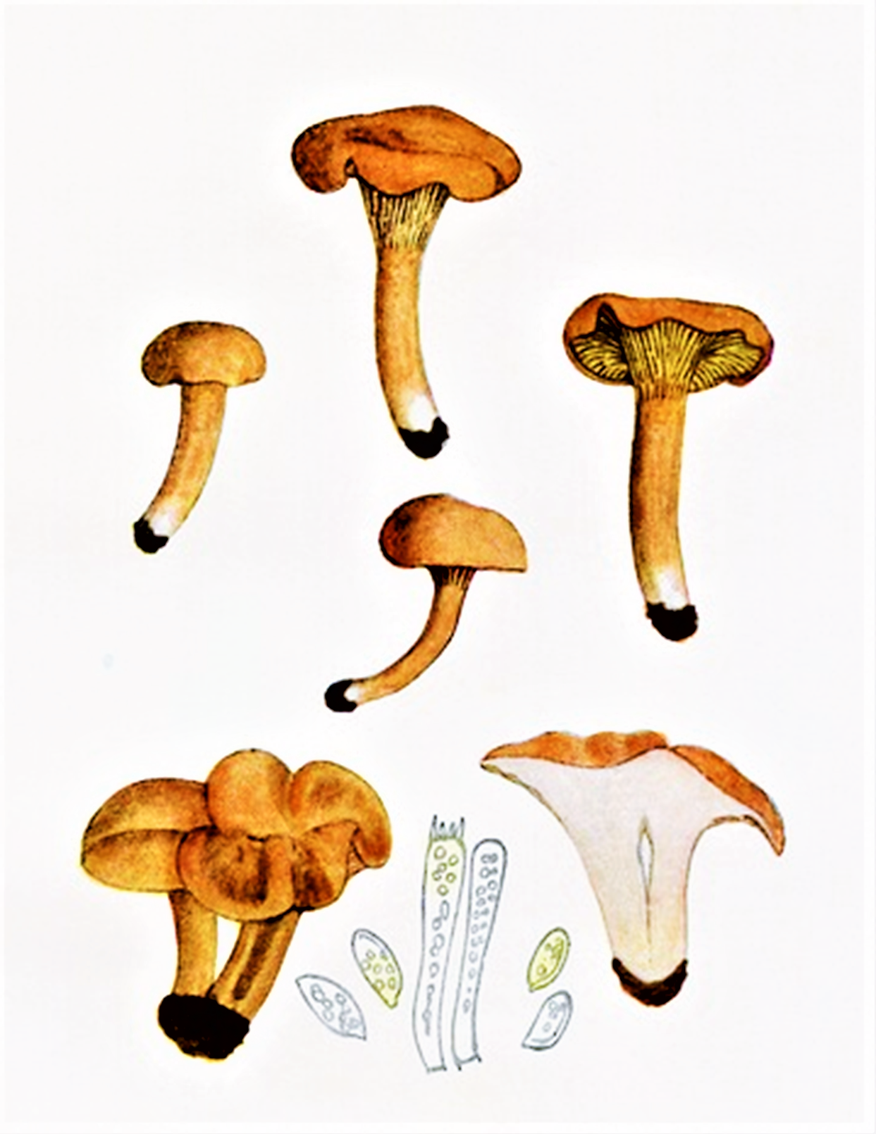 Giacomo Bresadola: Cantharellus friesii Quél. (1872)